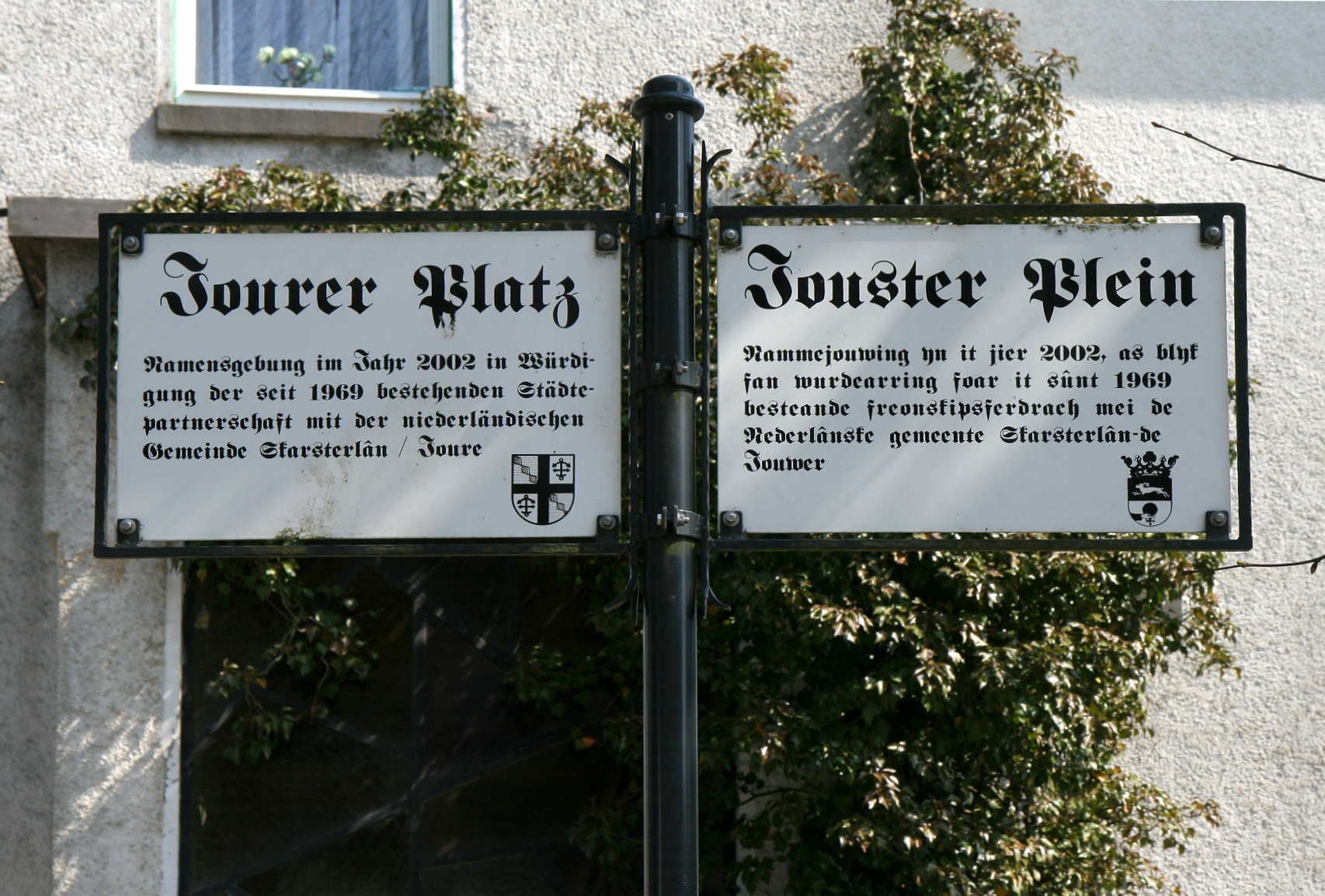 Schilder am Jourer Platz in Drolshagen.